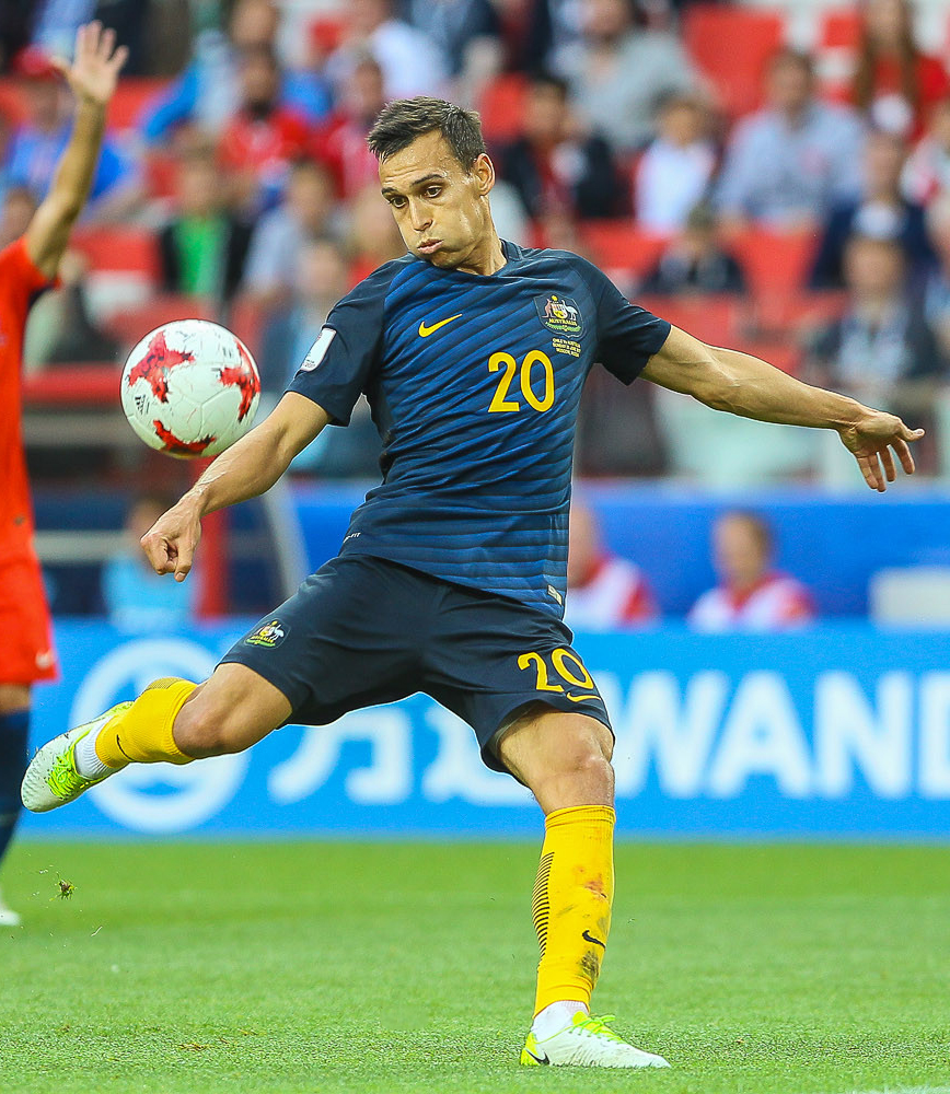 Чили - Австралия